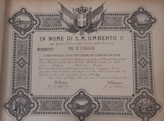 Fotocopia del diploma di laurea di Angelo Scribanti